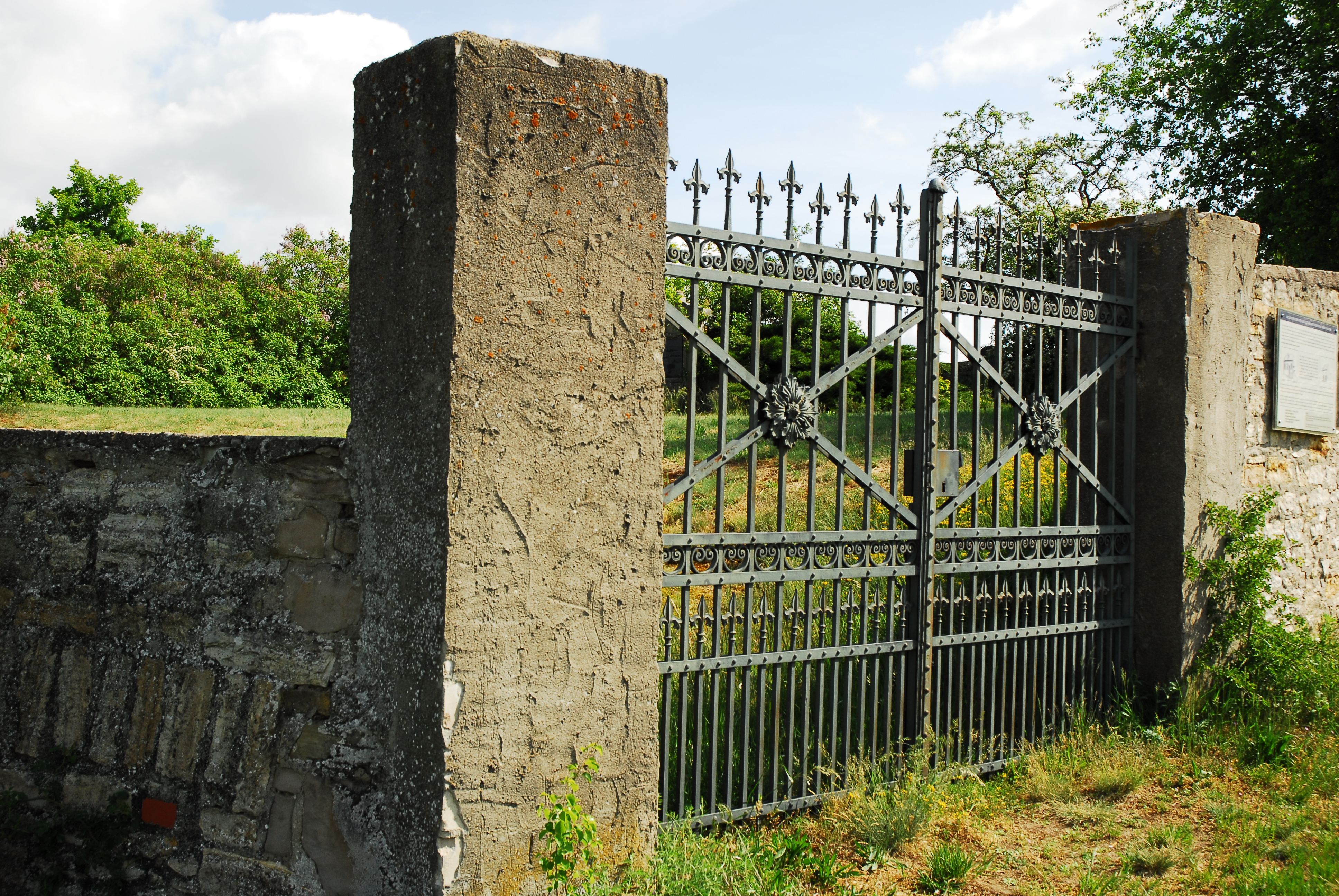 Jüdischer Friedhof in Gau-Algesheim, nordöstlich der Stadt, Flur Am Judensand; 1358 genannt, bis in die 1930er Jahre belegt; Einfriedungsmauer mit Tor, über 30 Grabsteine von der ersten Hälfte des 19. bis ins frühe 20. Jahrhundert